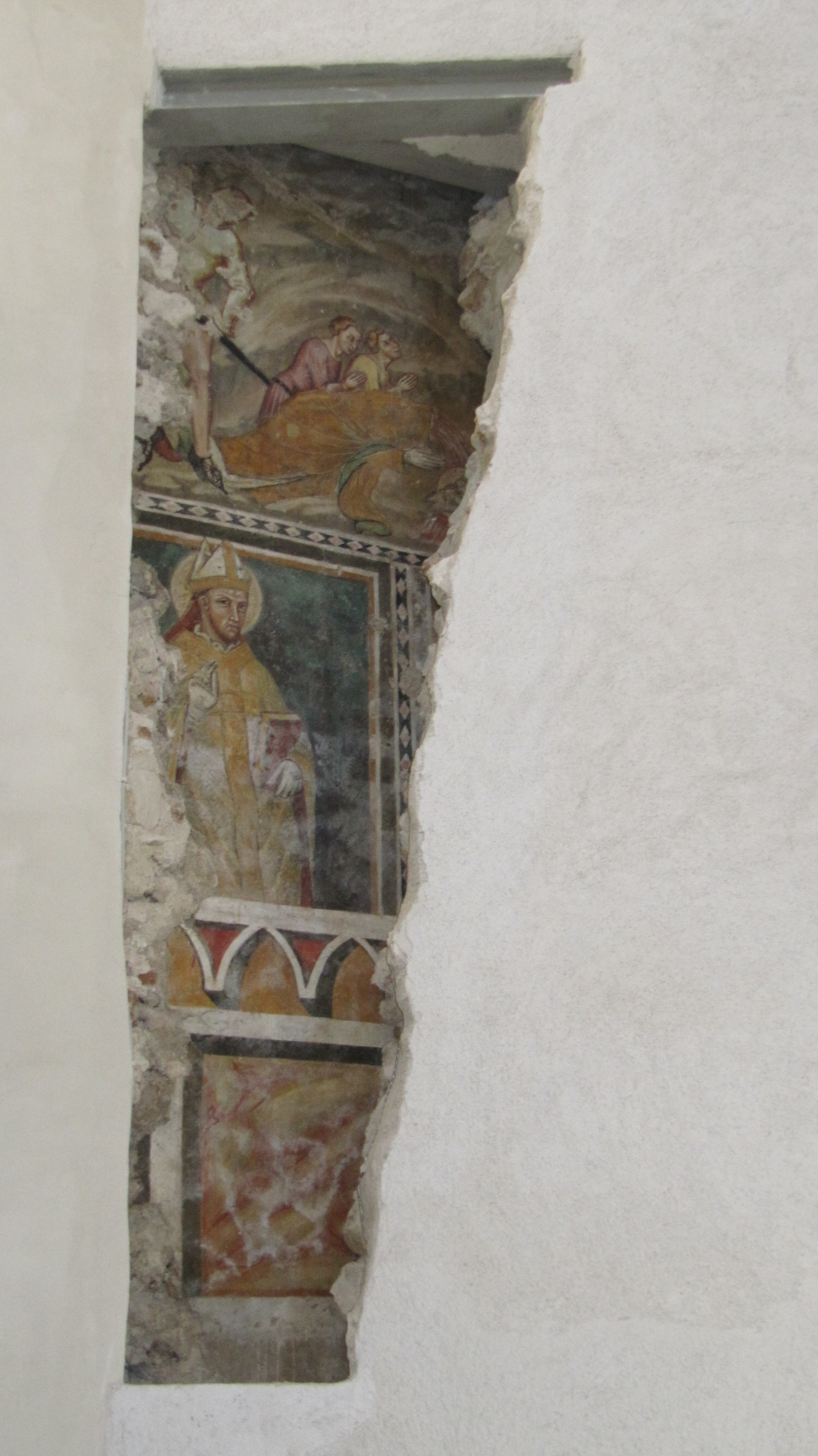 Resti del paramento figurativo risalente al XIII secolo.